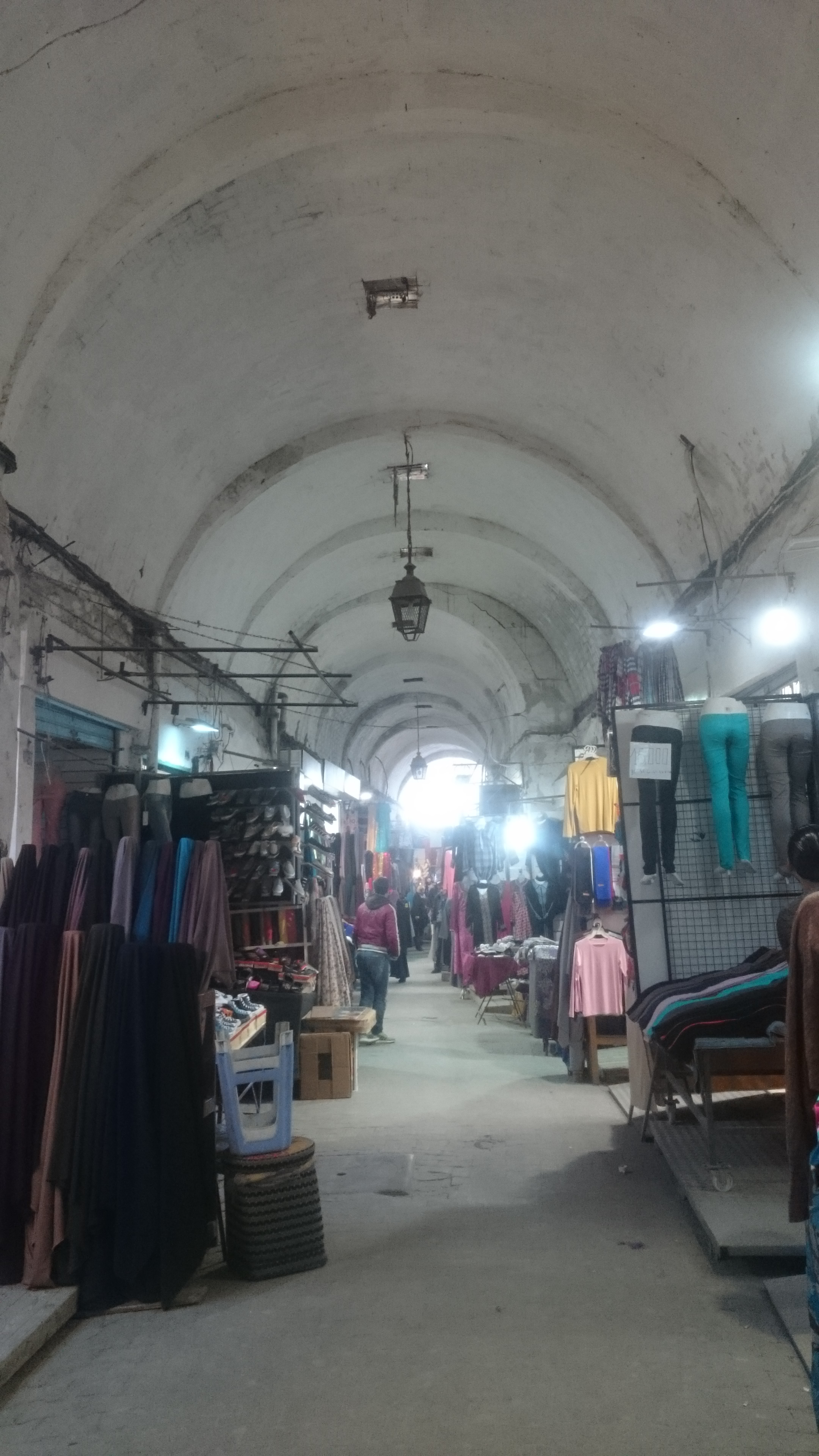 Une photo récente de Souk El Grana